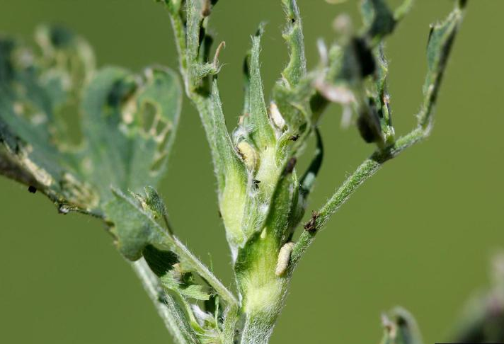 Pousse de luzerne attaquée par des larves du phytonome de la luzerne, Hypera postica